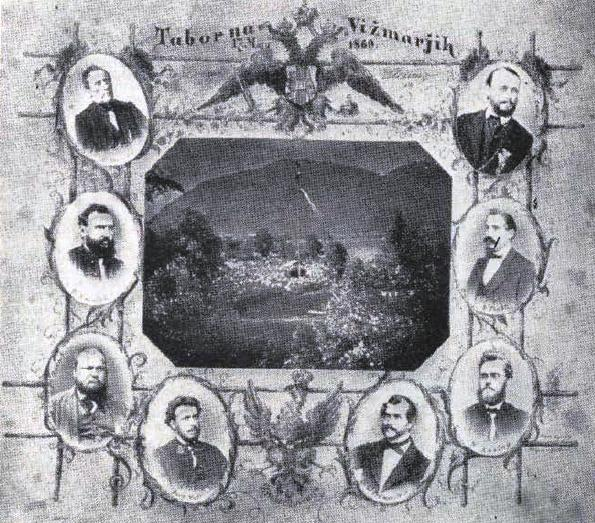 Slovenski tabor v Vižmarjih